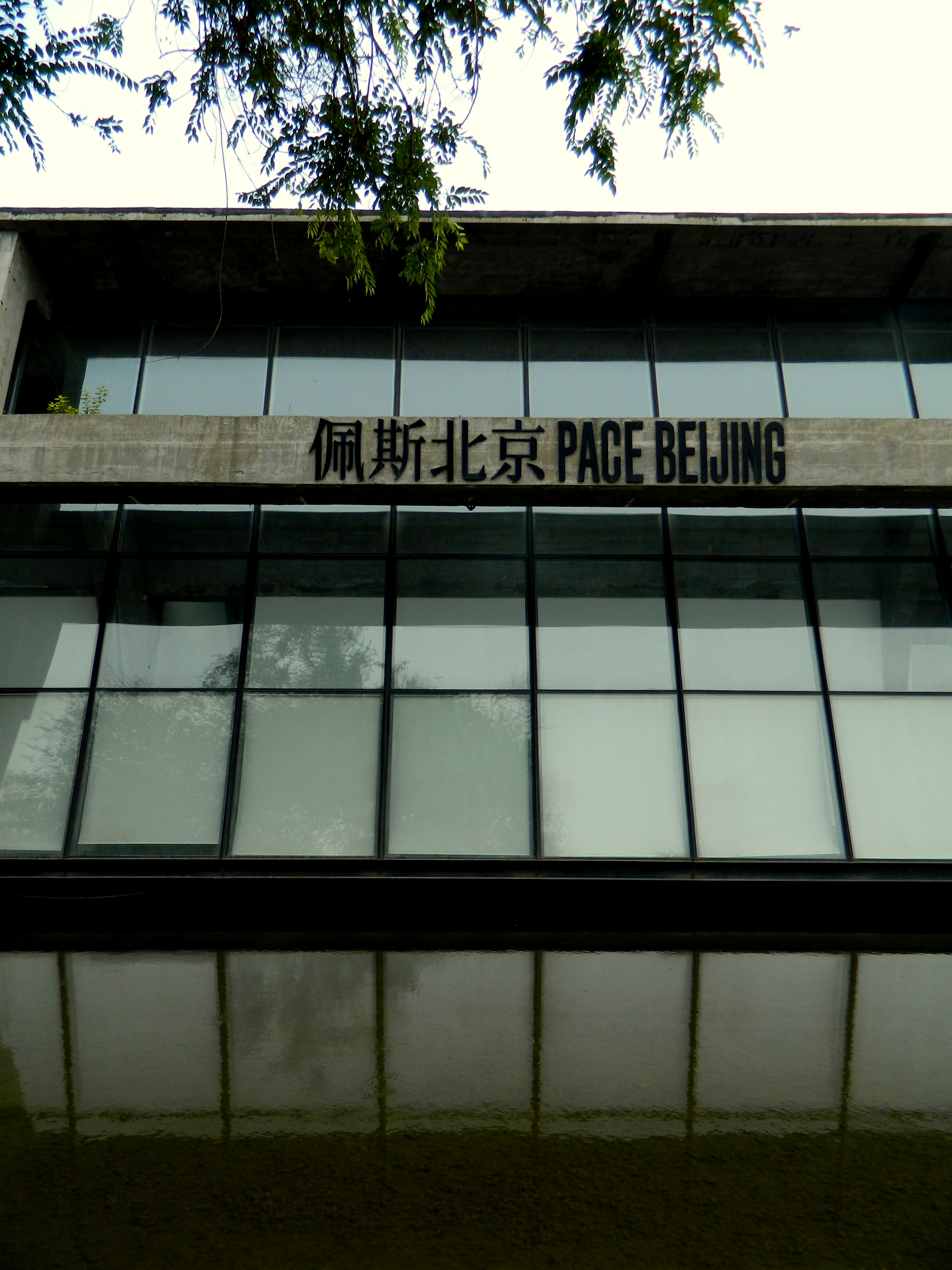 佩斯北京 Pace Beijing Art Gallery